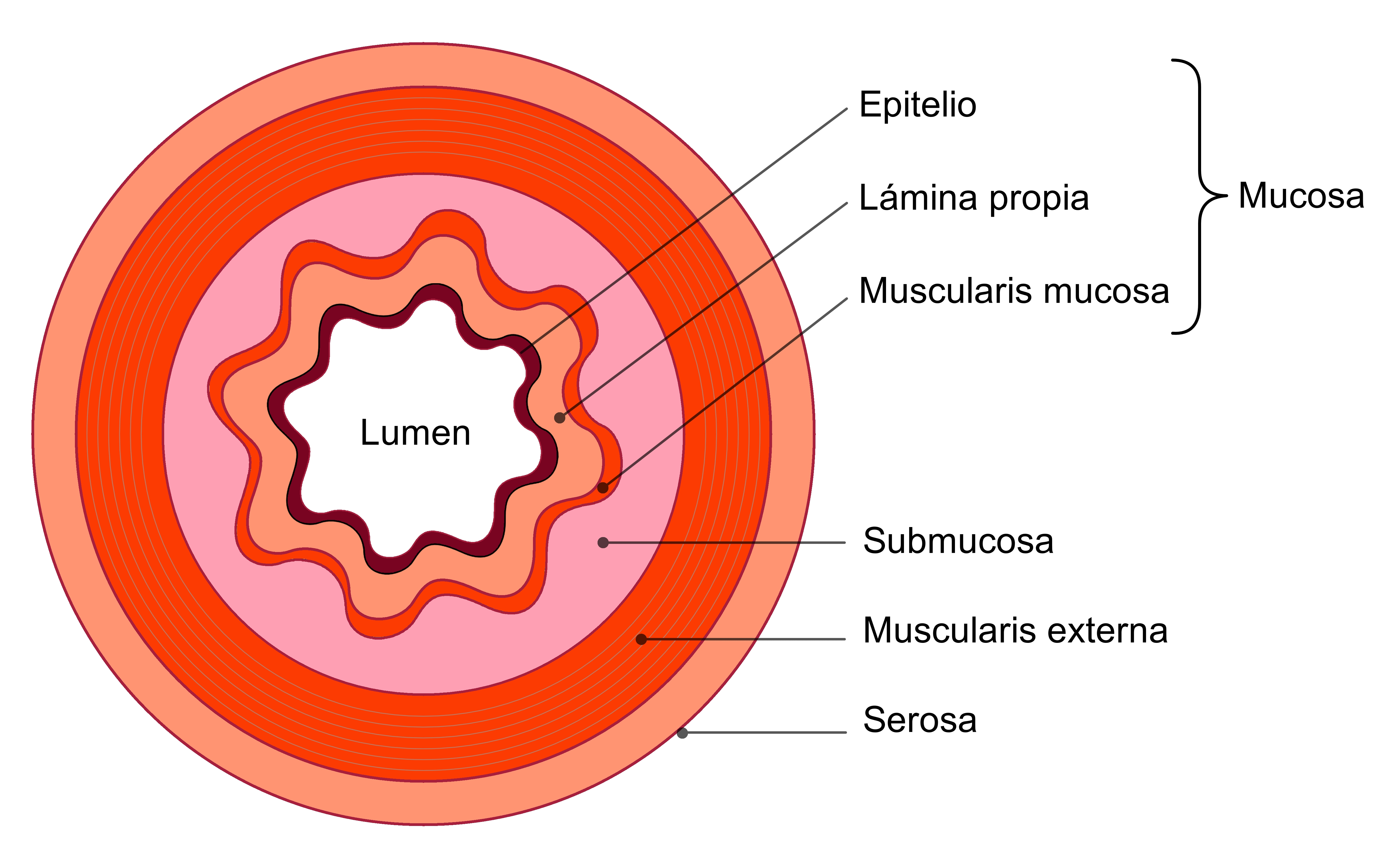 Esquema en el que se representan las cuatro capas que forman la pared del tubo digestivo.